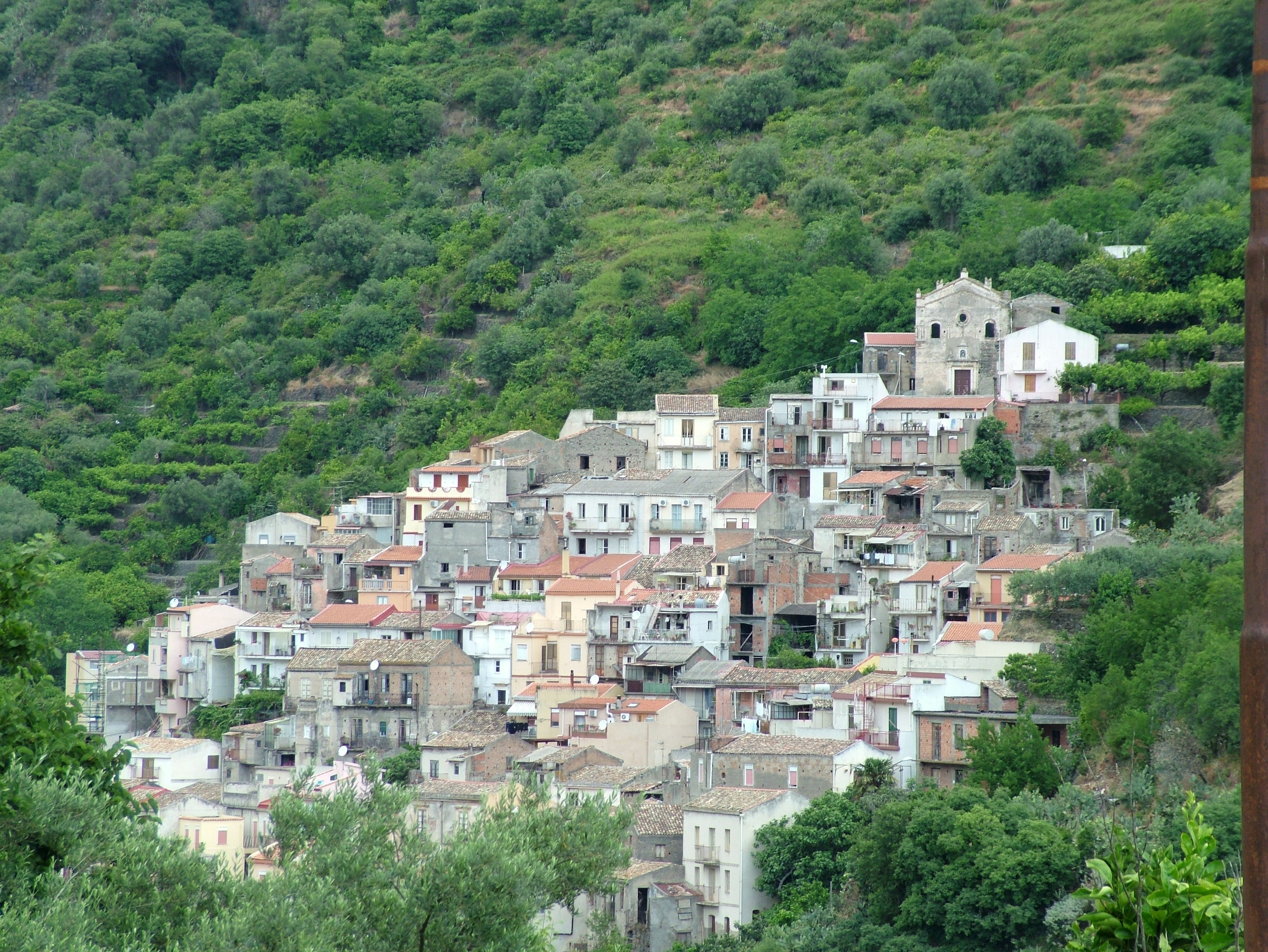 Itala, Provinz Messina, Sizilien, die Stadt